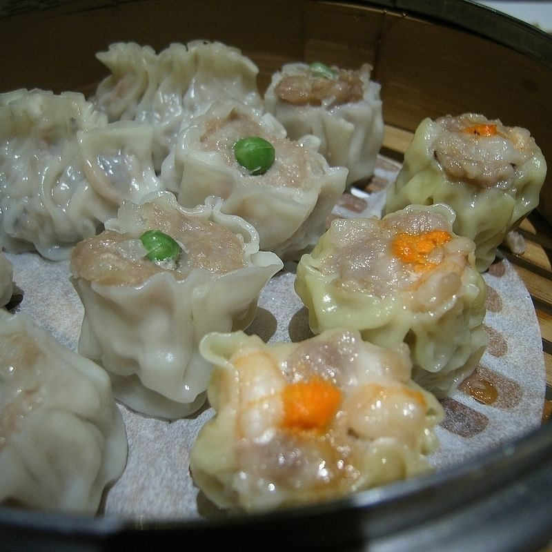 焼売（シュウマイ） 烧卖